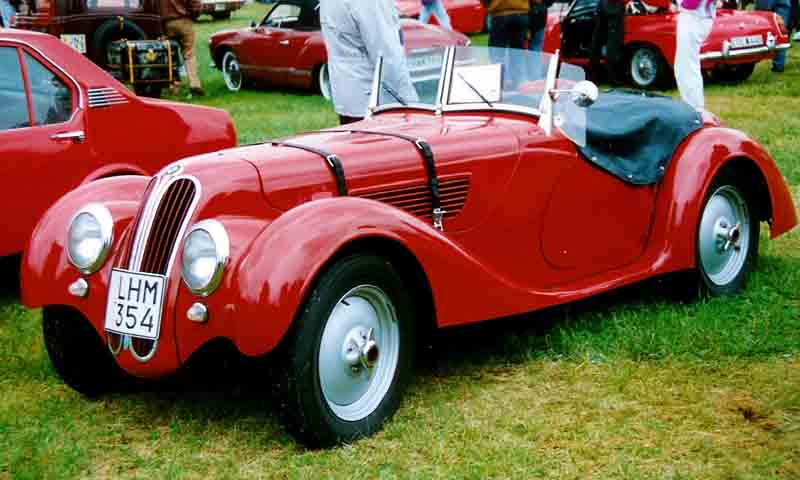 B.M.W. 328 Sportwagen 1938